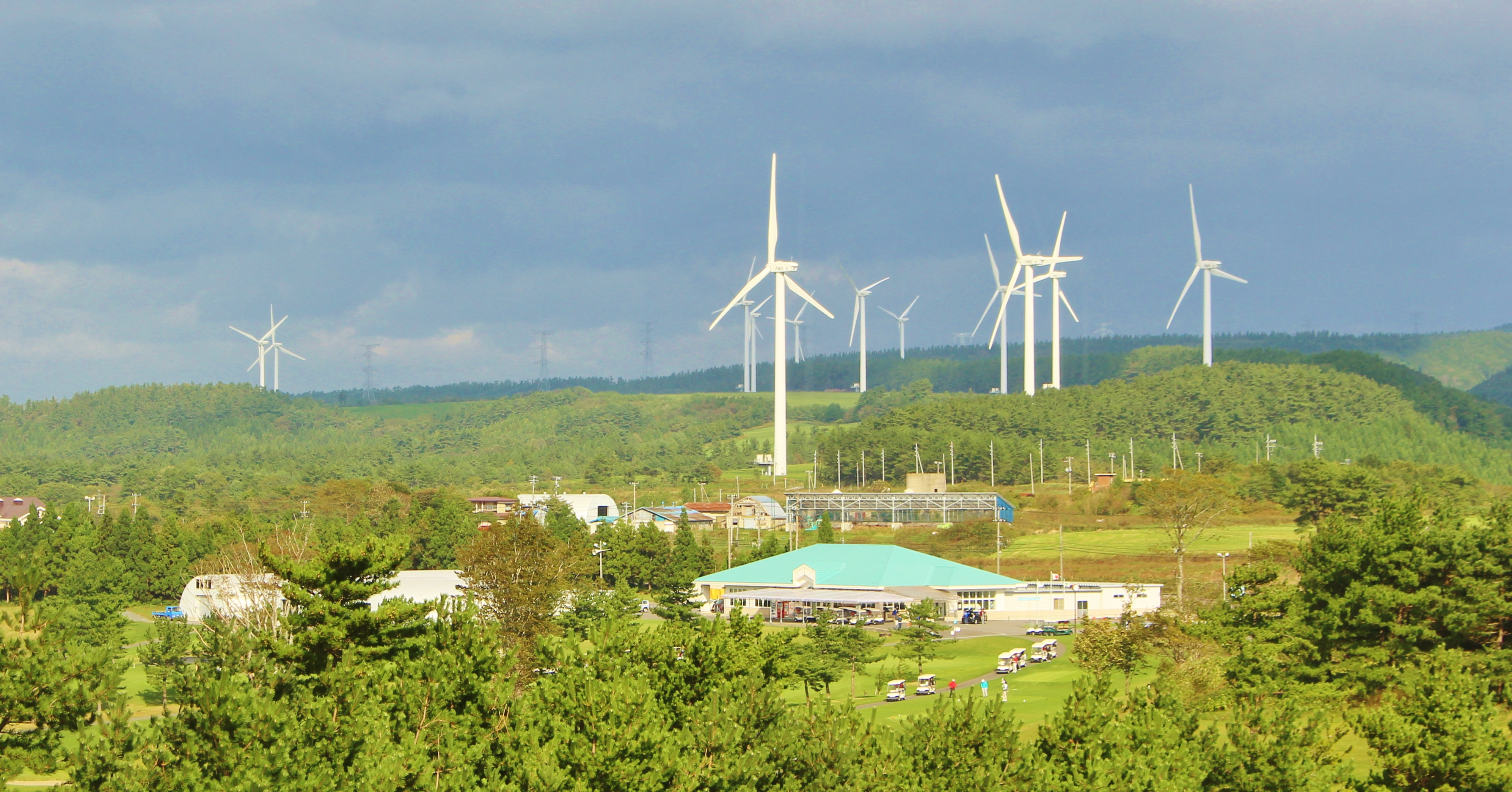 六ヶ所村原燃PRセンターより北側、ゴルフ場と風力発電所を望む